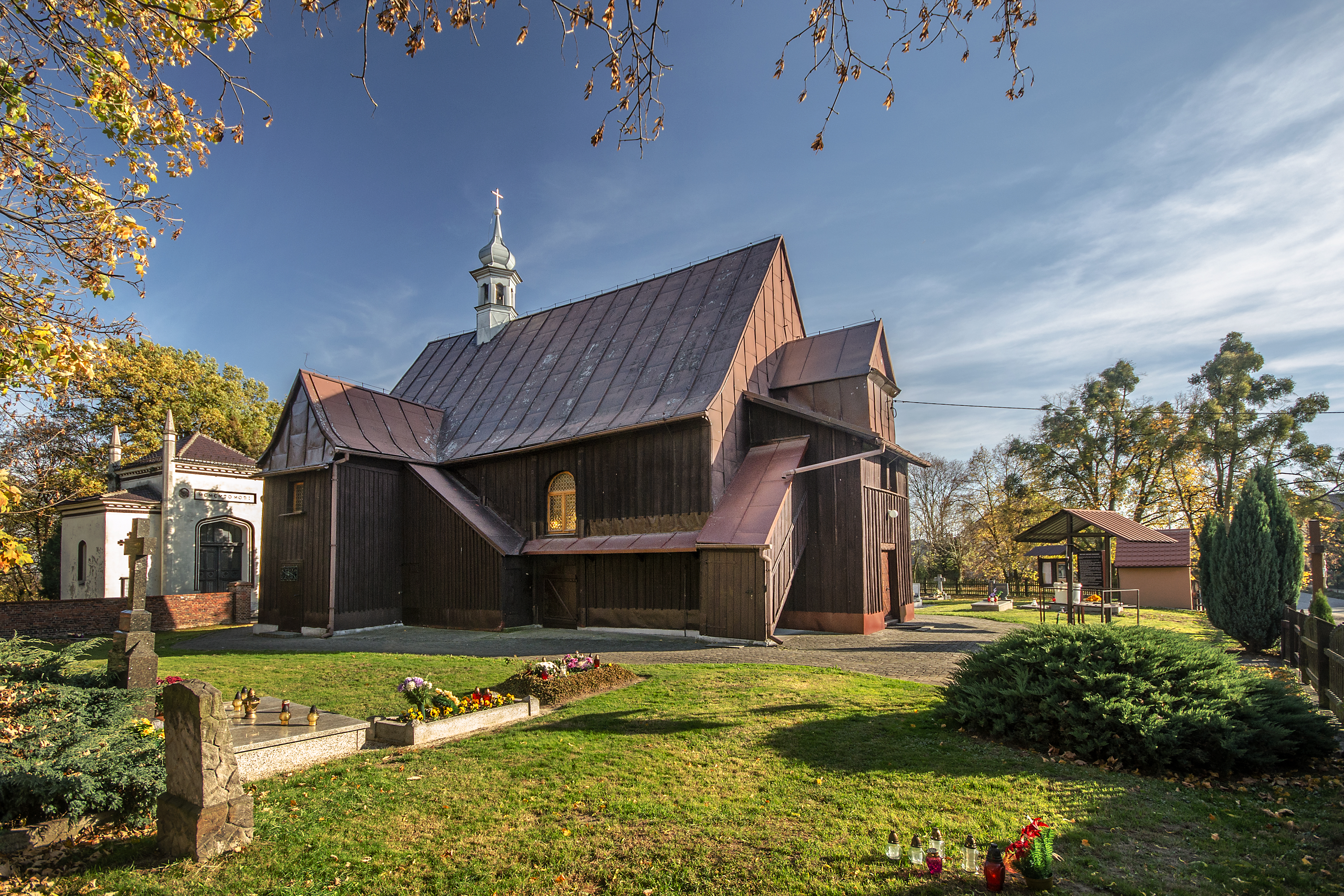 Miejsce Odrzańskie, kościół pw. Św. Trójcy, 1770